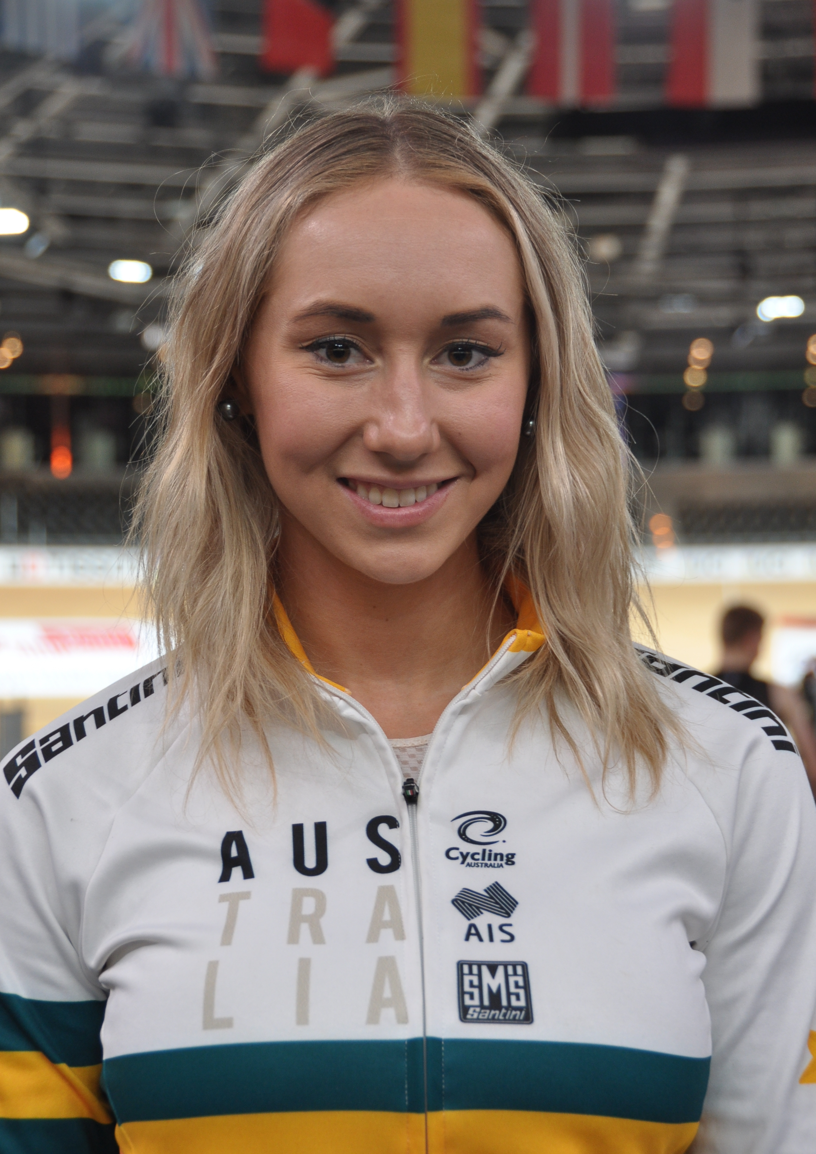 Maeve Plouffe, australischer Radsportler